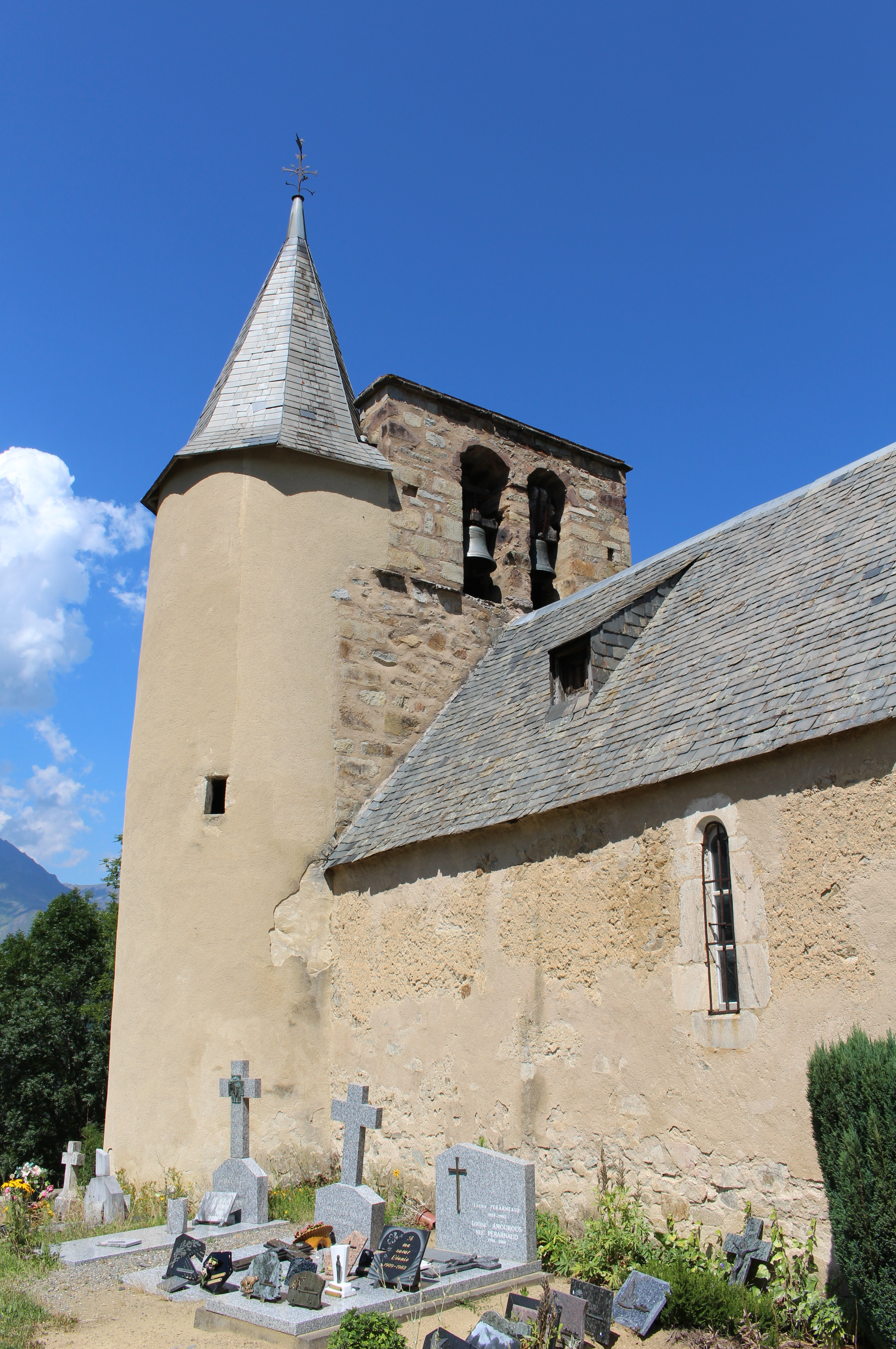 Église Saint-Blaise de Ris (Hautes-Pyrénées)